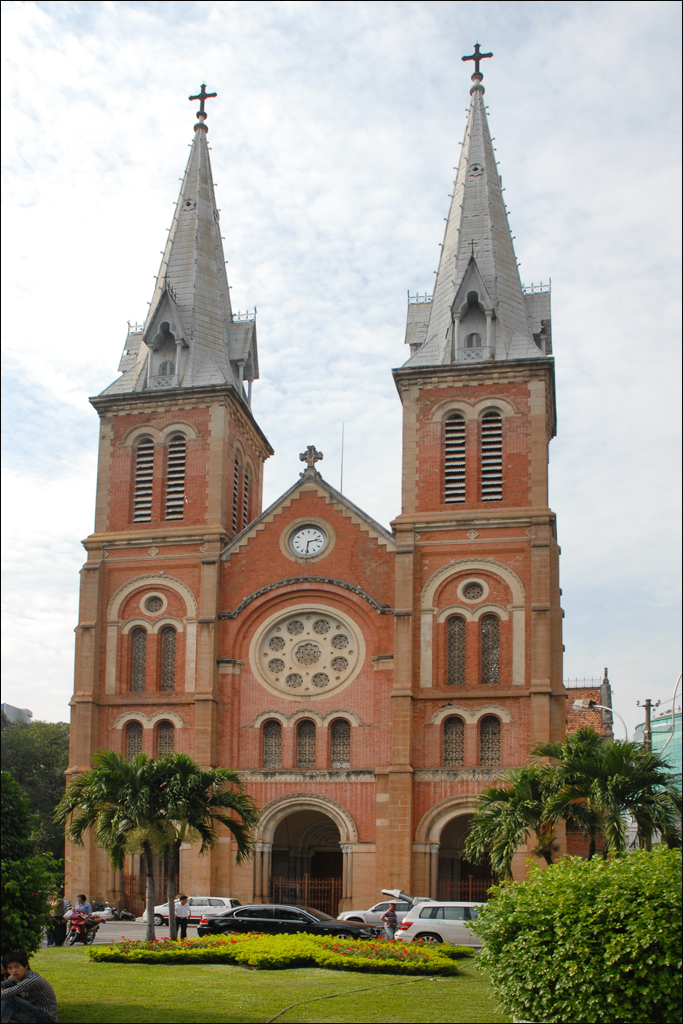 Conçue par l'architecte français Jules Bourard au milieu de la décennie 1870, la cathédrale Notre-Dame est l'un des monuments marquants du centre historique d'HCM-Ville. Elle est située place de Paris dans l'axe de la grande rue Dong Khoi, l'ancienne rue Catinat de l'époque coloniale.